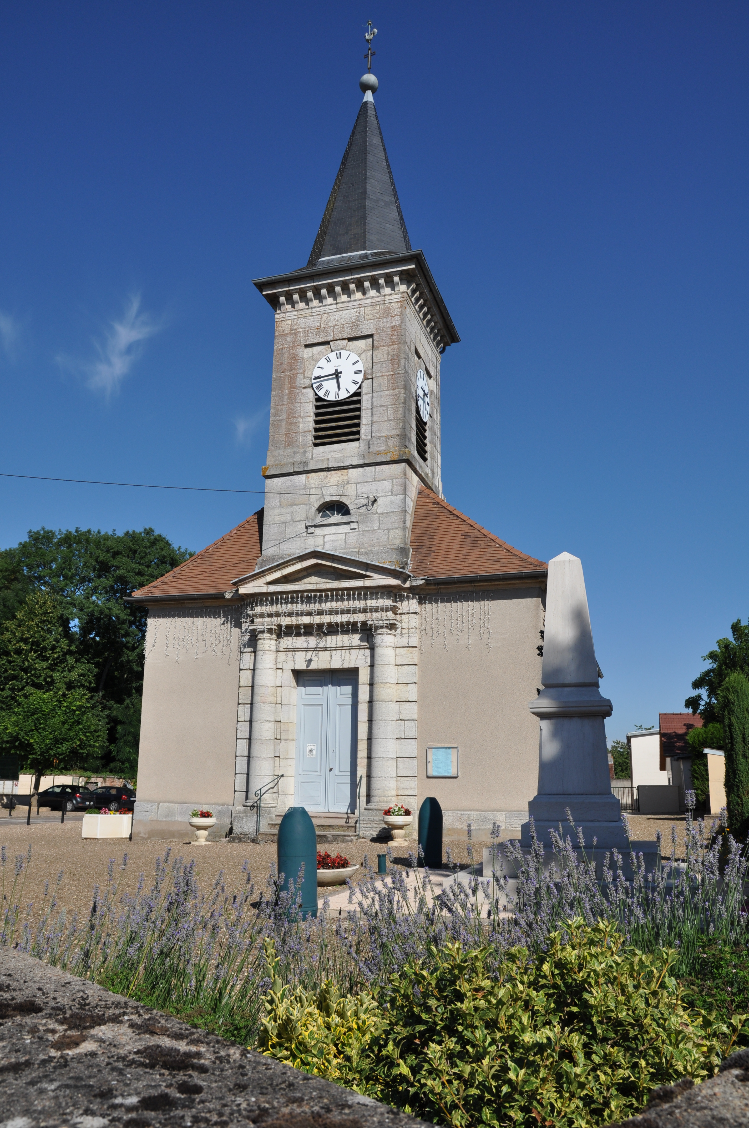 Lieu : Tillenay Edifices : église Saint-Denis, monument aux morts.